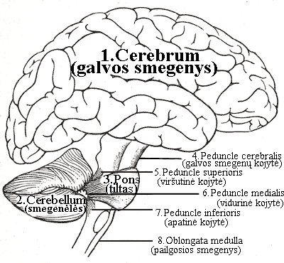 Galvos smegenų dalys